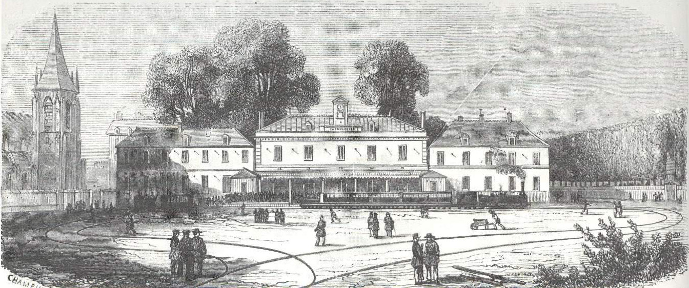 détail gravure du XIXe. Gare de Sceaux et locomotive système Arnoux